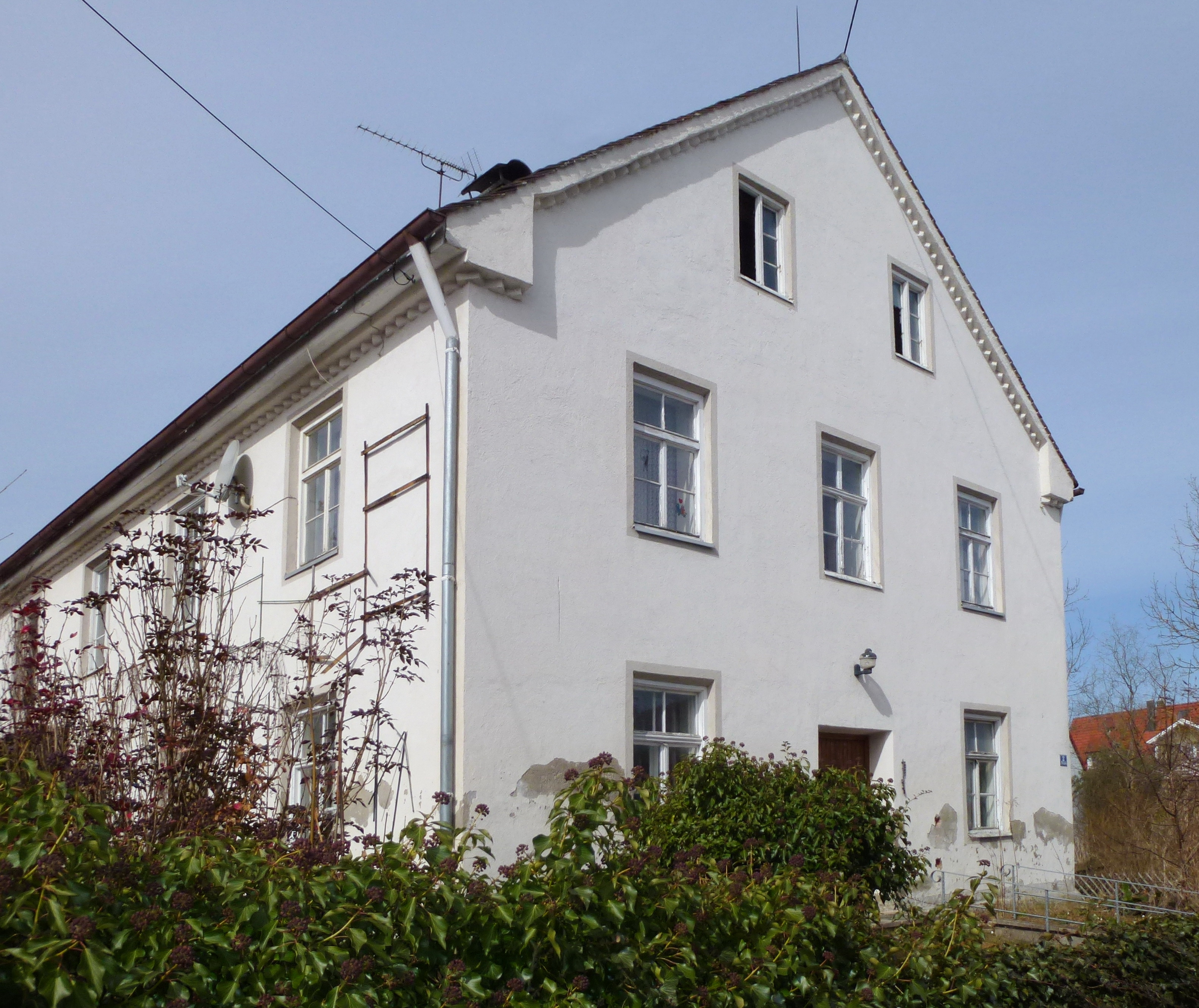 Windach_Pfarrgasse 2, Ehem Pfarrhaus, Ansicht von SO